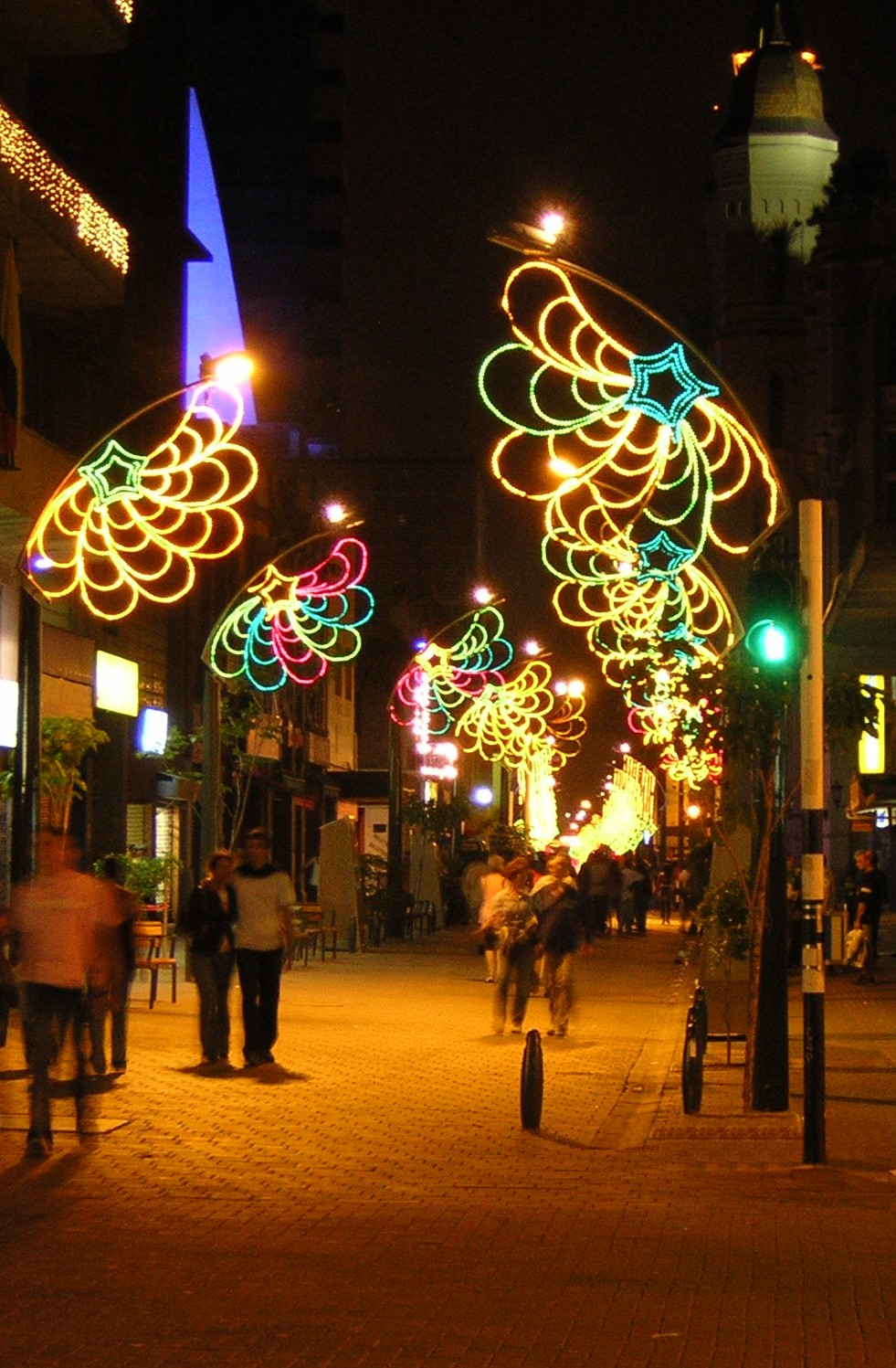 Alumbrados Navideños por el paseo peatonal Carabobo 2006, Medellín, Colombia